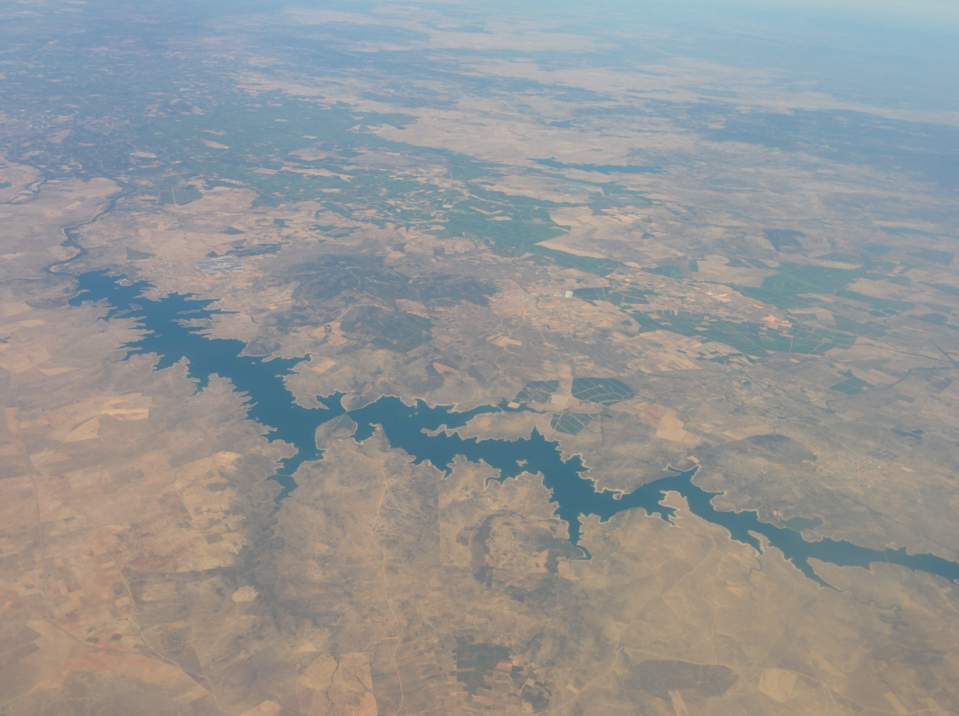 Vista aérea del embalse de Orellana, en Badajoz (España).